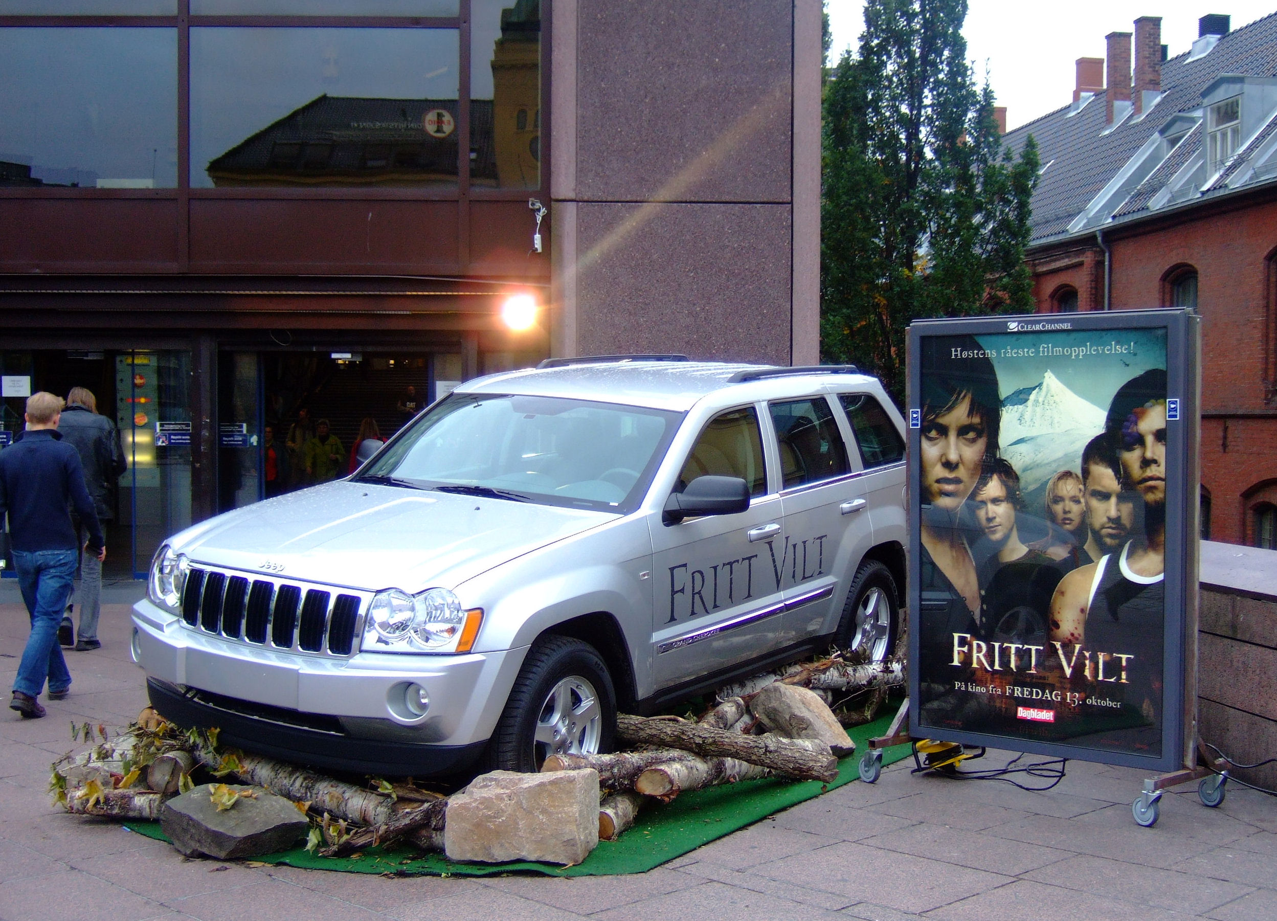 Fritt Vilt PR stand in Oslo